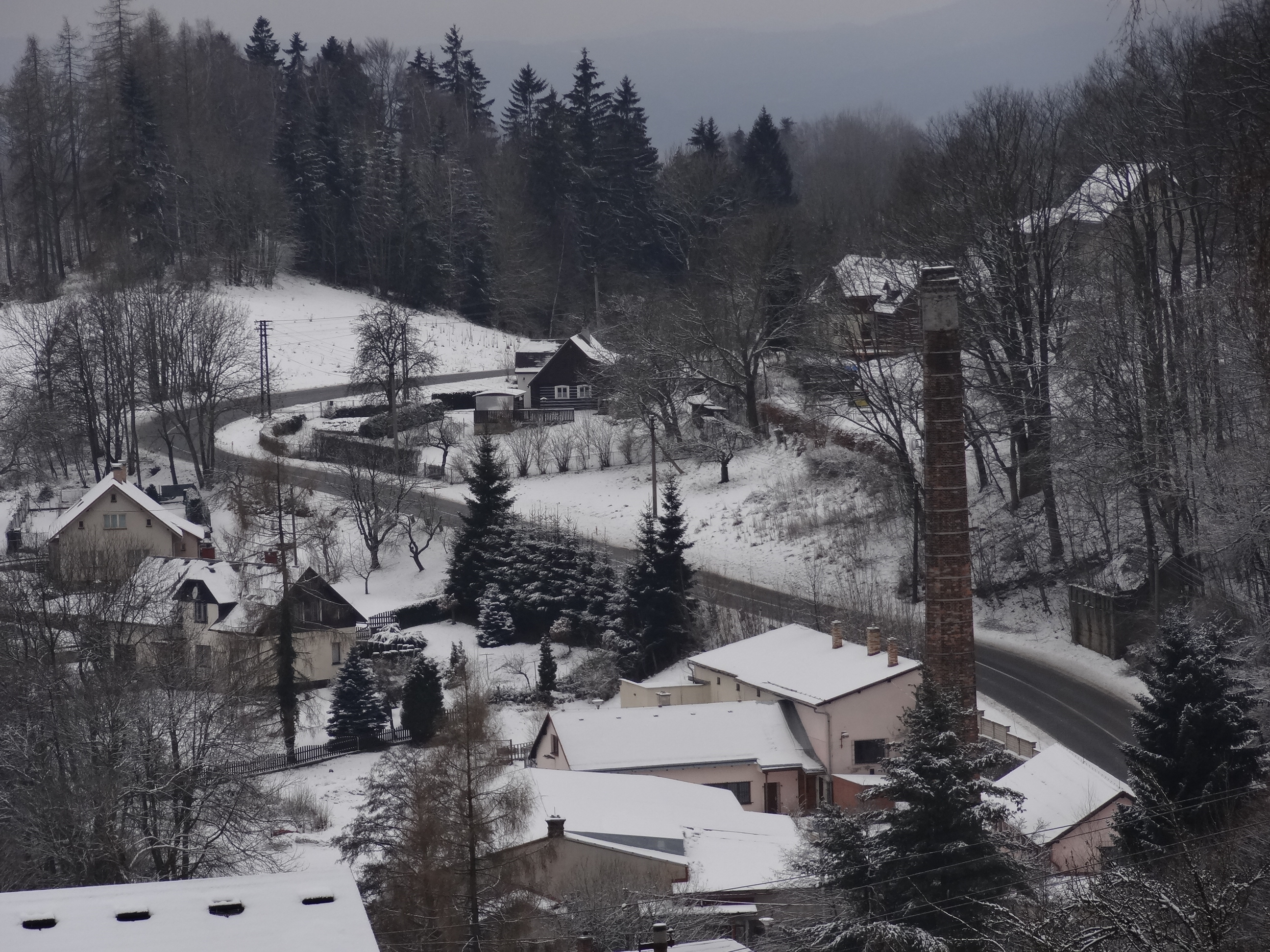 Anděl Strážce (u Frýdštejna) - celkový pohled, v popředí továrna Na Barborce